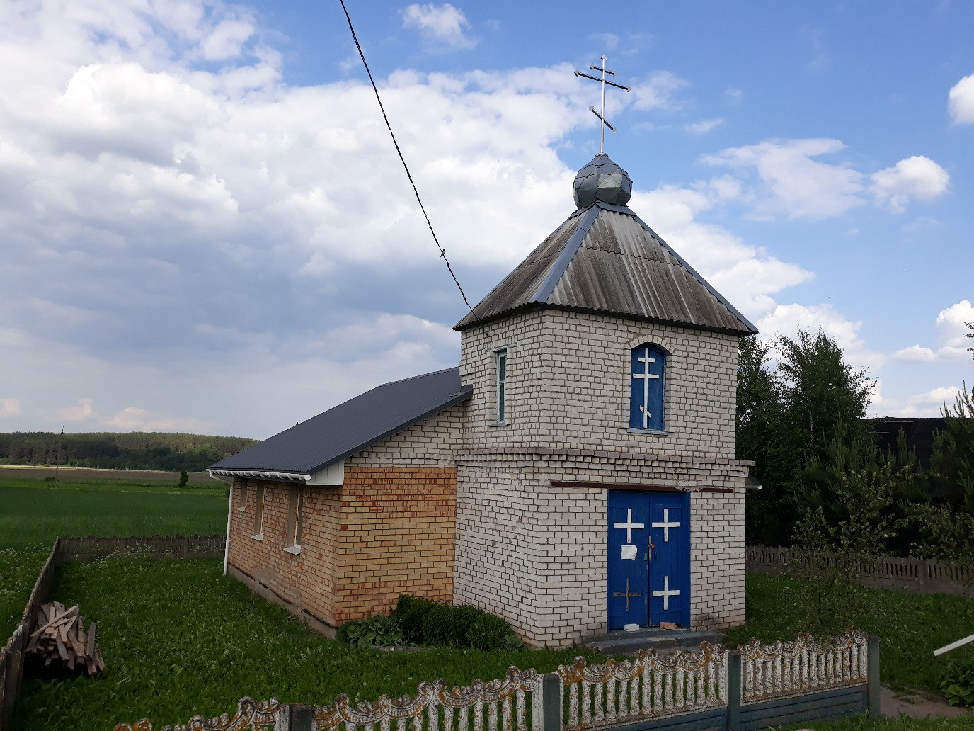 царква св. Міхаіла Арханёла